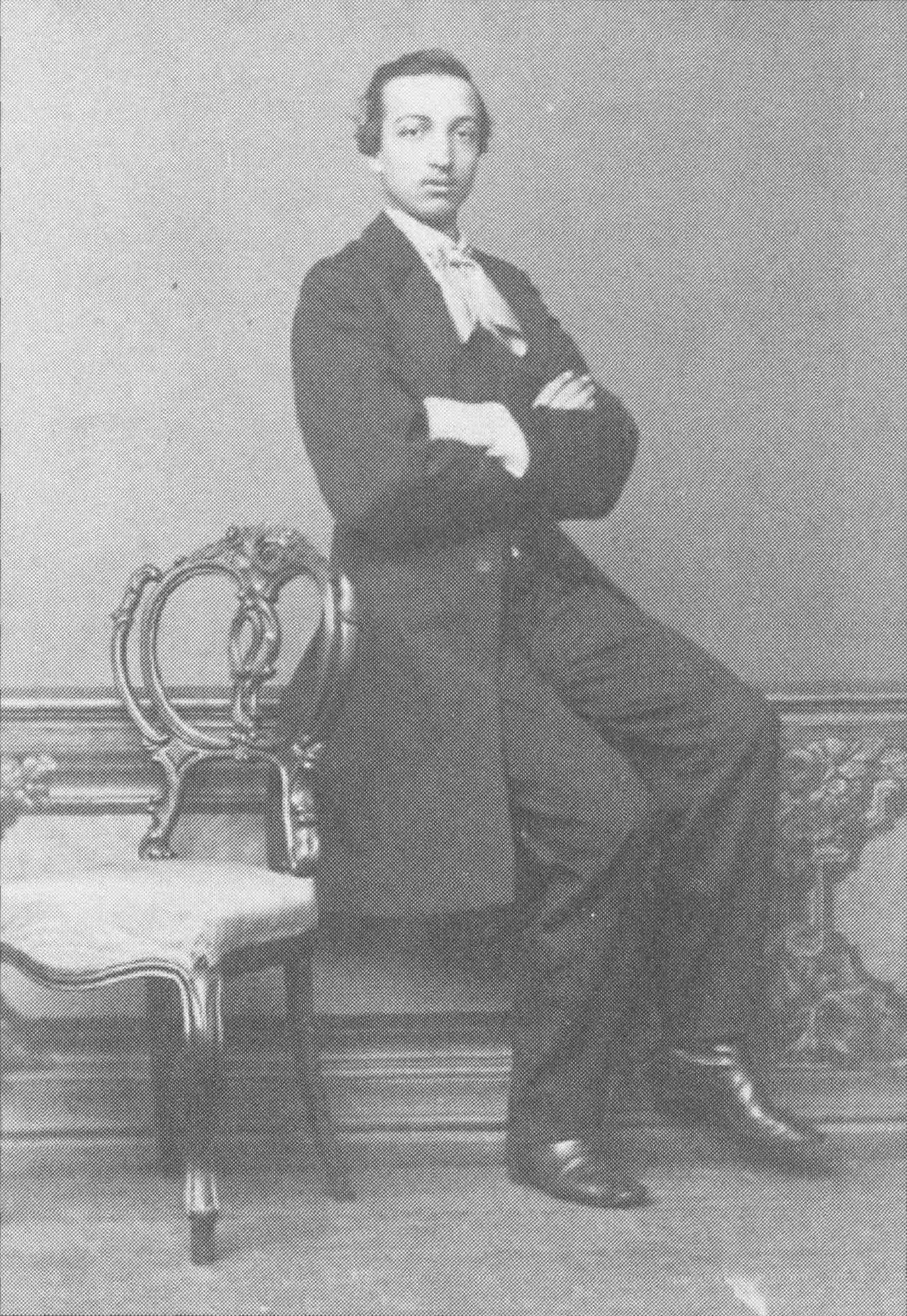 Беларуская (тарашкевіца): Эдвард Вайніловіч